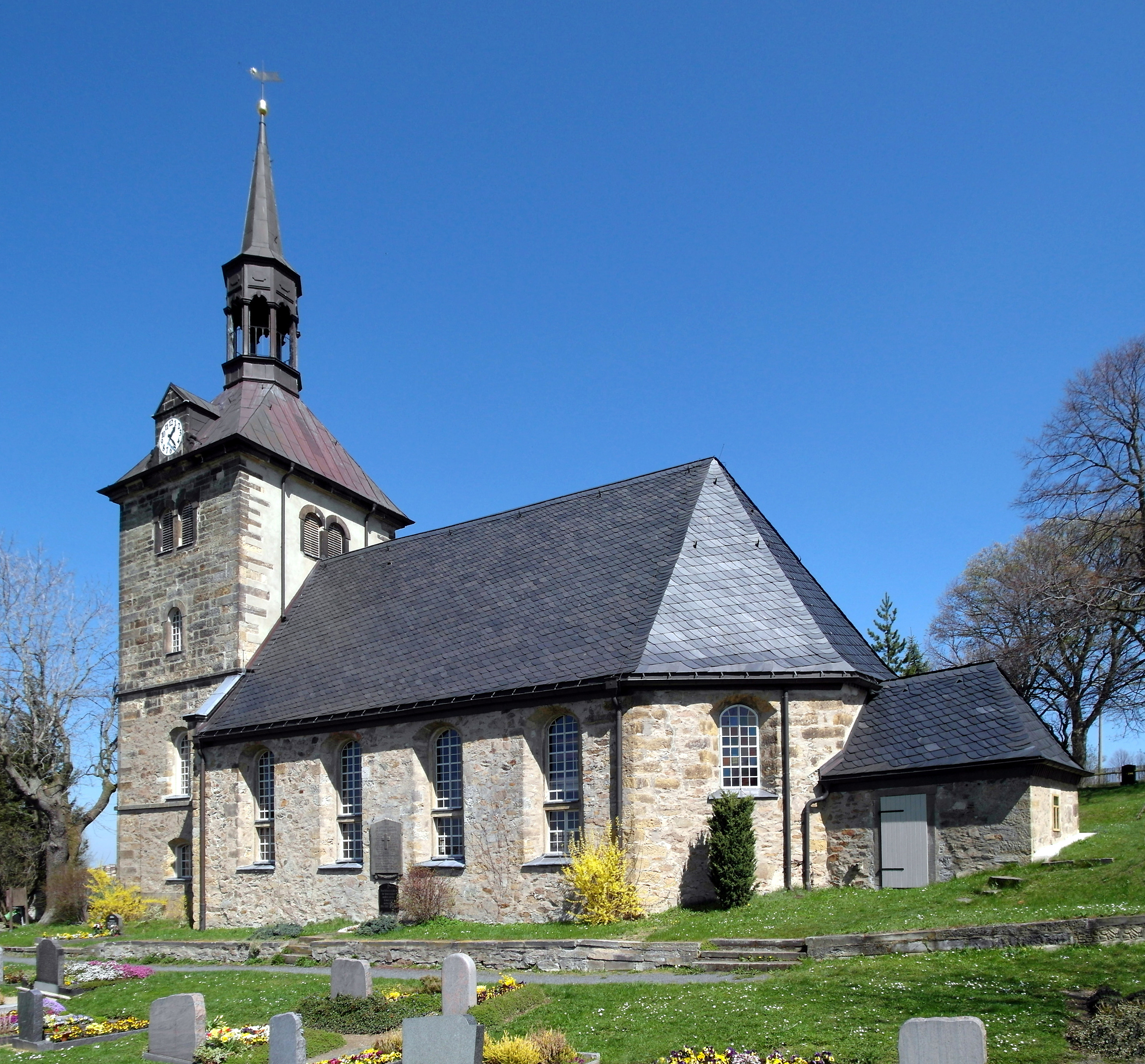 21.04.2016 01825 Börnersdorf (Bad Gottleuba-Berggießhübel), Börnersdorf 11 (GMP: 50.825893,13.880948). Die Evangelische Dorfkirche mit der unüblichen Nord-Süd Ausrichtung wurde 1672-74 erbaut. Der Kirchturm wurde erst 1865 errichtet, nachdem der vorherige Glocken-Dachreiter 1863 durch einen Blitz zerstört worden war. [SAM4792-4793.JPG]20160421500MDR.JPG(c)Blobelt